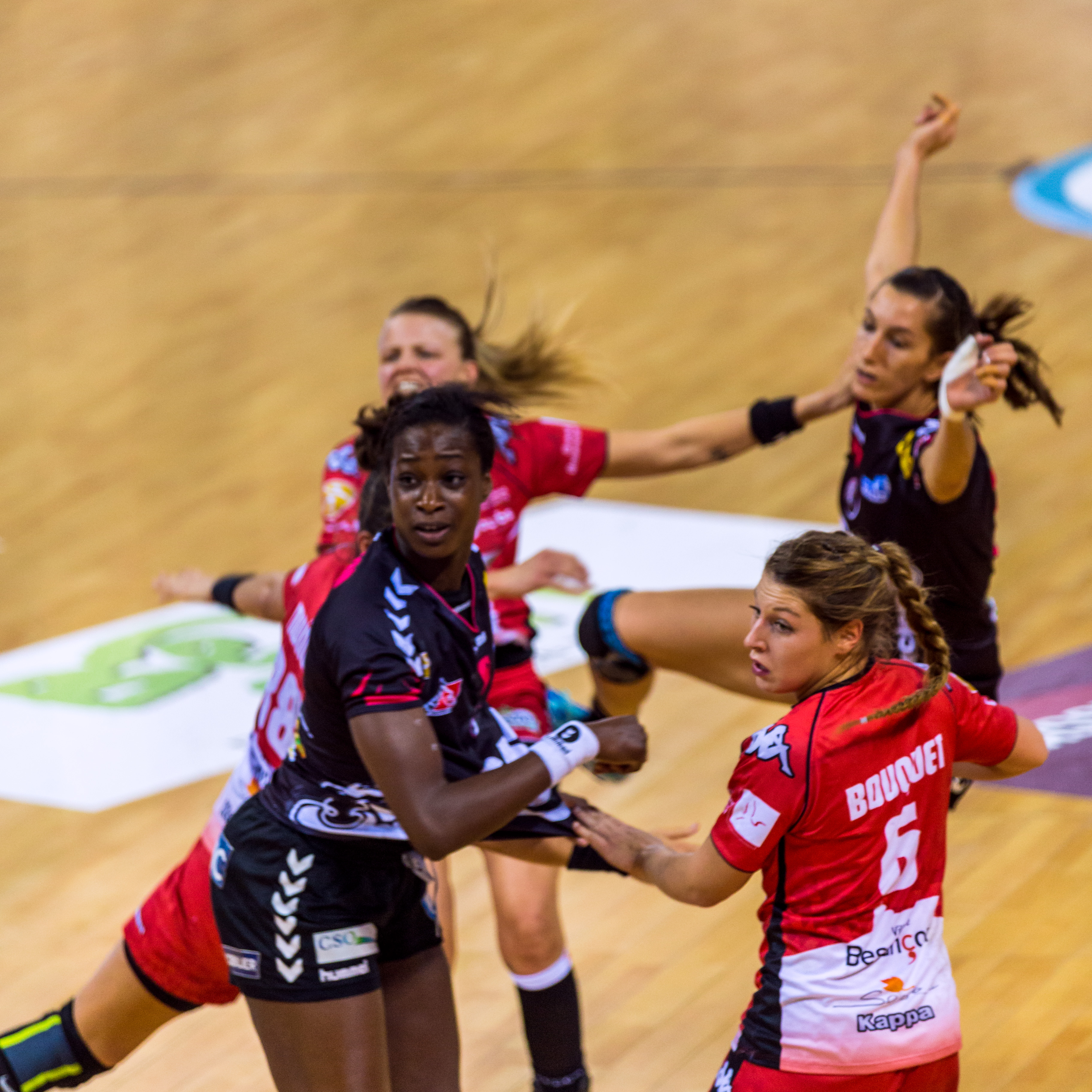 Astride N'Gouan et Chloé Bouquet lors du match de handball du BREST Bretagne Handball à domicile face à Besançon (Entente Sportive Bisontine Féminin) le 16 novembre 2016. La Brest Arena a vu son club l'emporter 24-21.